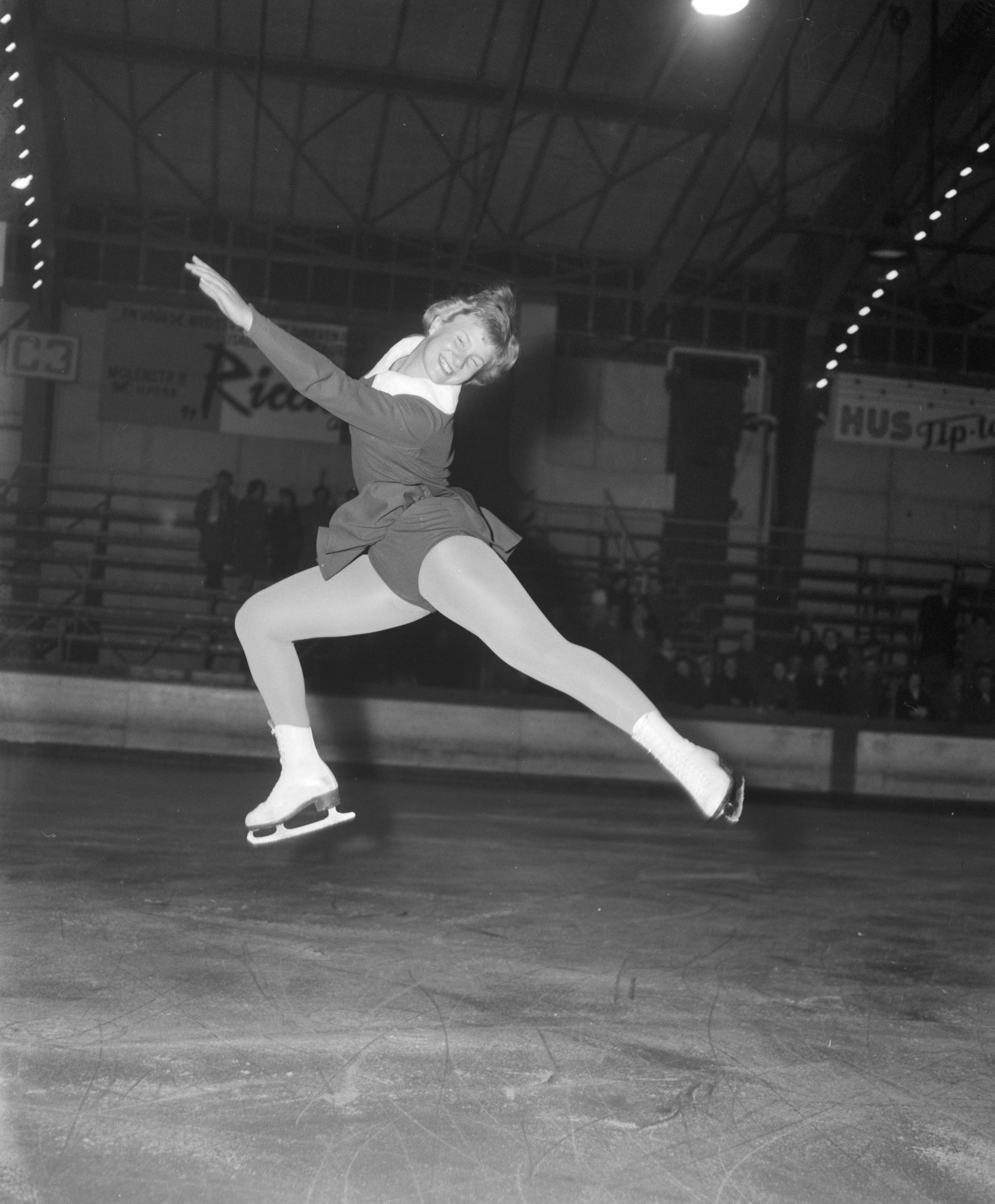 Collectie / Archief : Fotocollectie Anefo Reportage / Serie : [ onbekend ] Beschrijving : Nationale kampioenschappen kunstrijden op de schaats op de Hoky te Den Haag Datum : 17 maart 1959 Fotograaf : Rossem, Wim van / Anefo Auteursrechthebbende : Nationaal Archief Materiaalsoort : Negatief (zwart/wit) Nummer archiefinventaris : bekijk toegang 2.24.01.04 Bestanddeelnummer : 910-2207